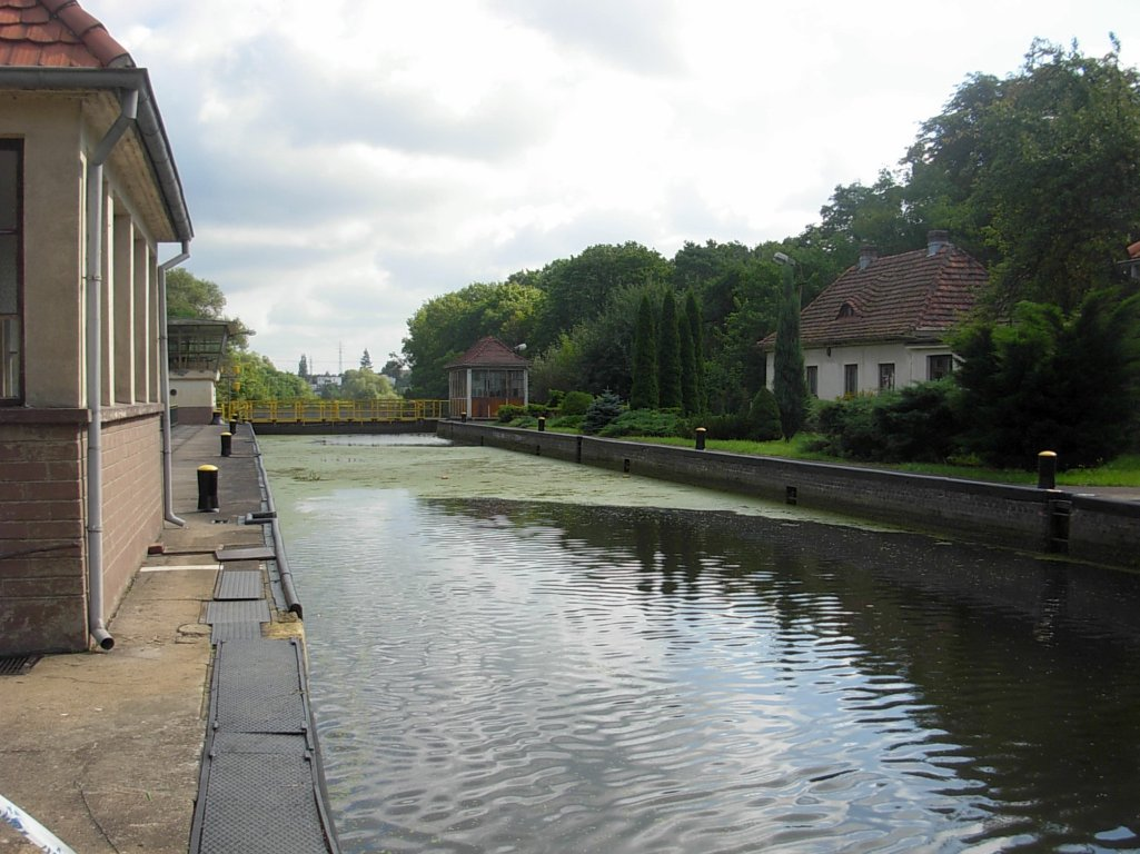 Śluza Okole na Kanale Bydgoskim